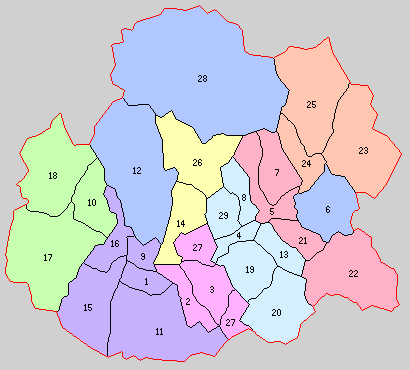 熊本県球磨郡の町村制時点の町村。